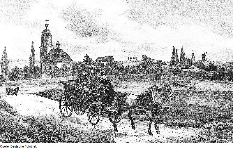 Original image description from the Deutsche Fotothek Göhren-Romschütz. Ortsansicht